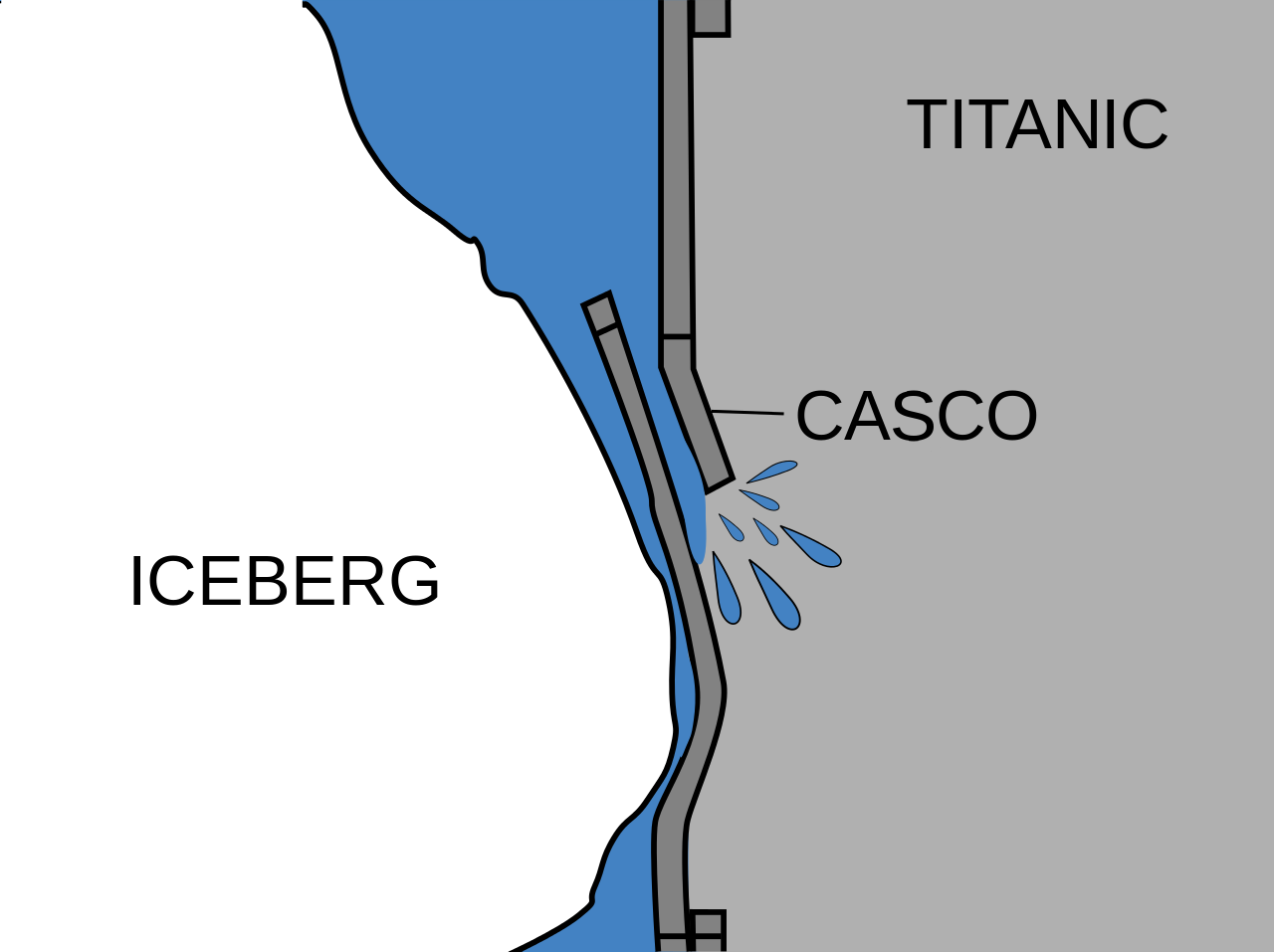 Versión en español de Image:Iceberg and titanic.png